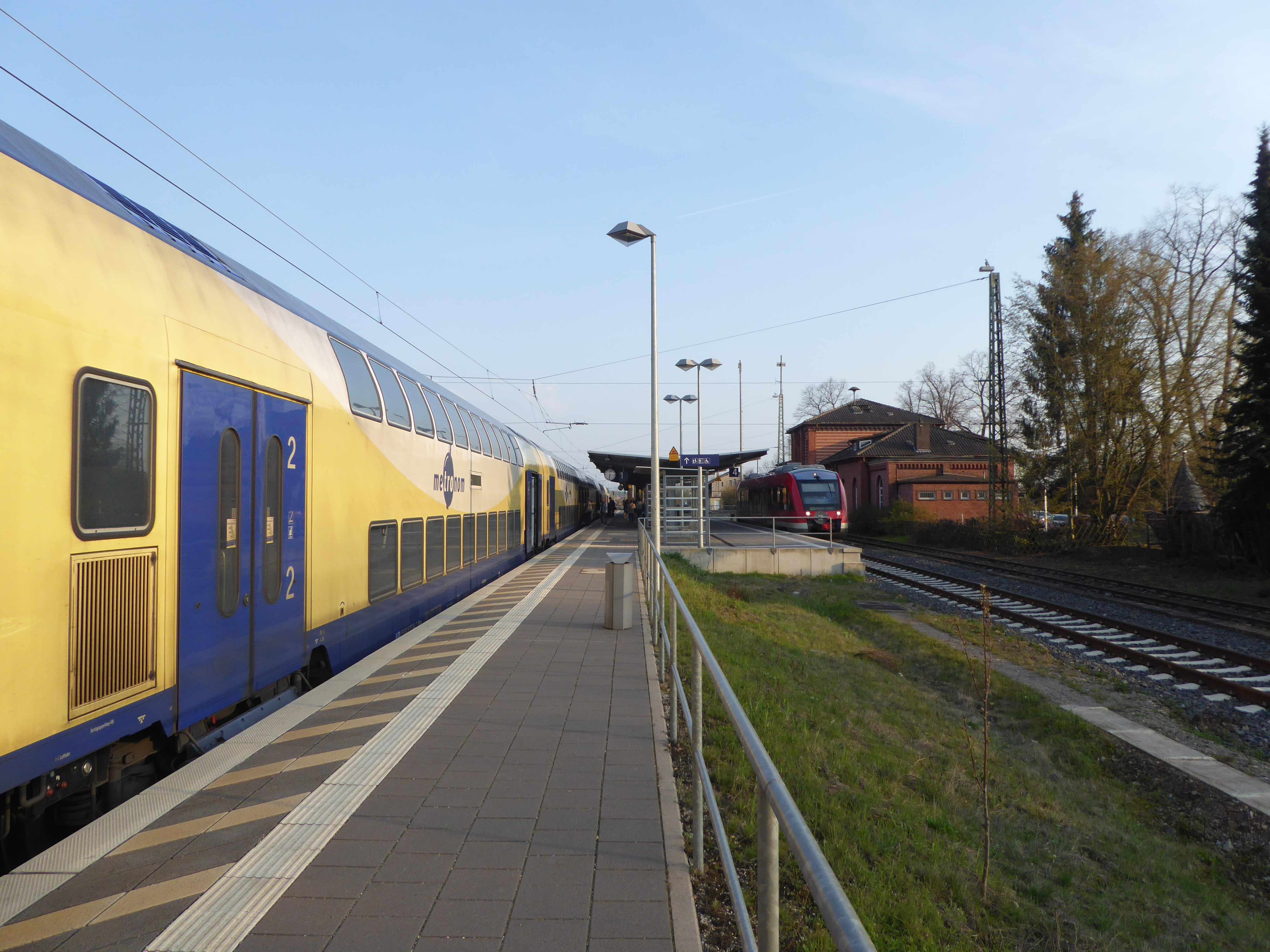 Ein Lint-27 Triebwagen nach Einbeck Mitte wartet in Salzderhelden auf Umsteiger aus dem Metronom Hannover - Göttingen.